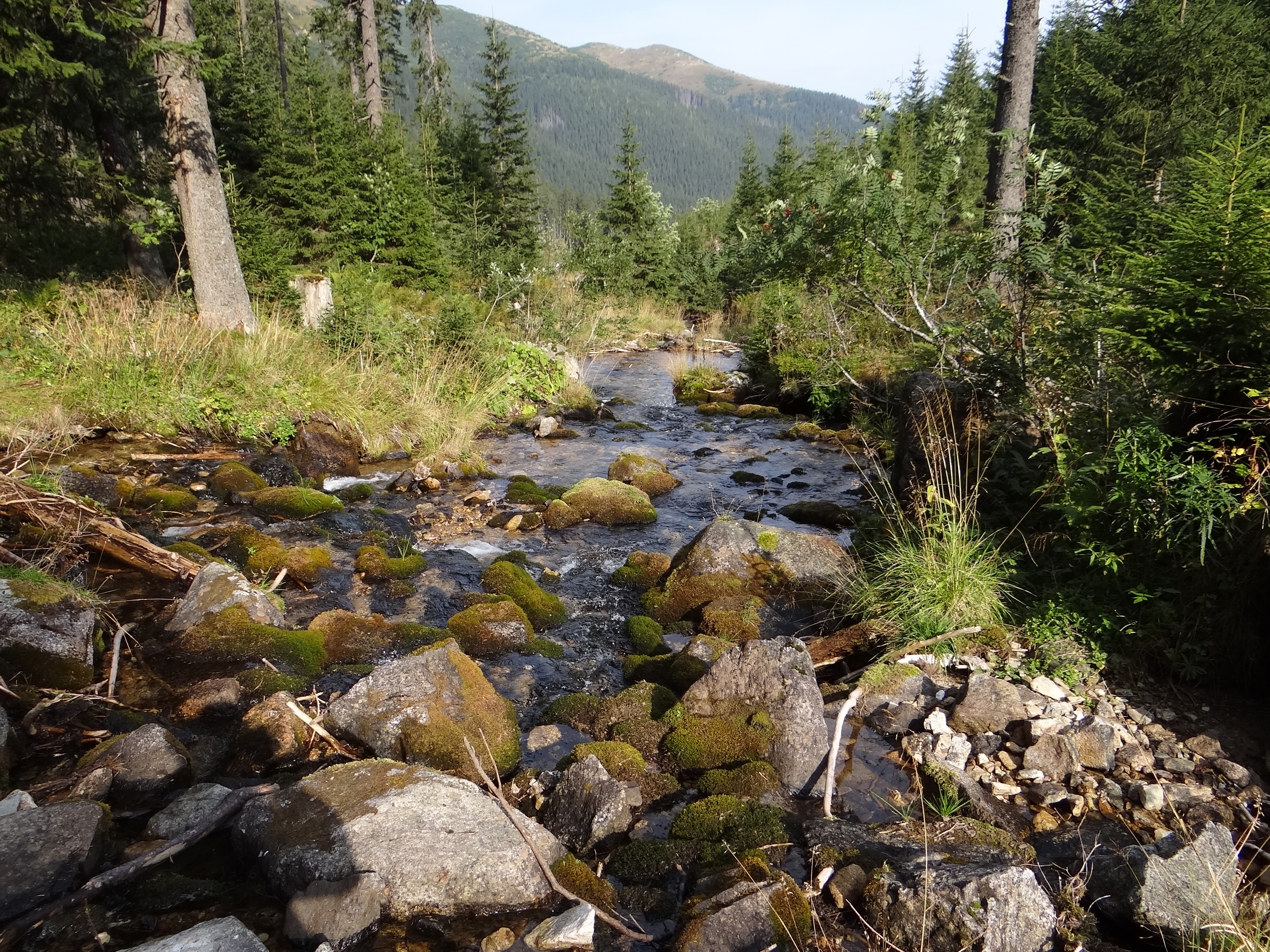 Jarząbczy Potok